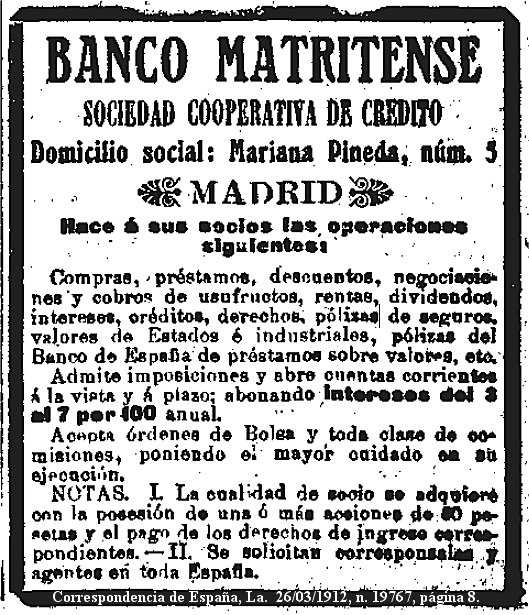 Banco Matritense aviso a los socios